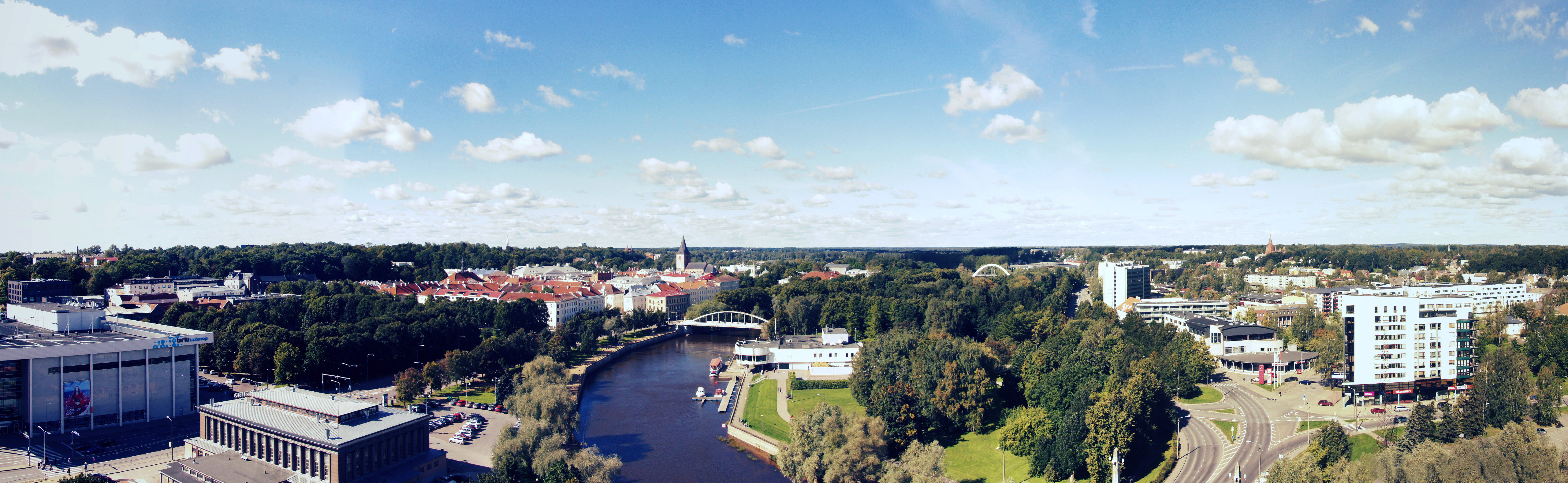 Panoraam Tartu linnast.